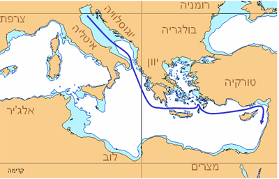 אוניית המעפילים קדימה - מסלול